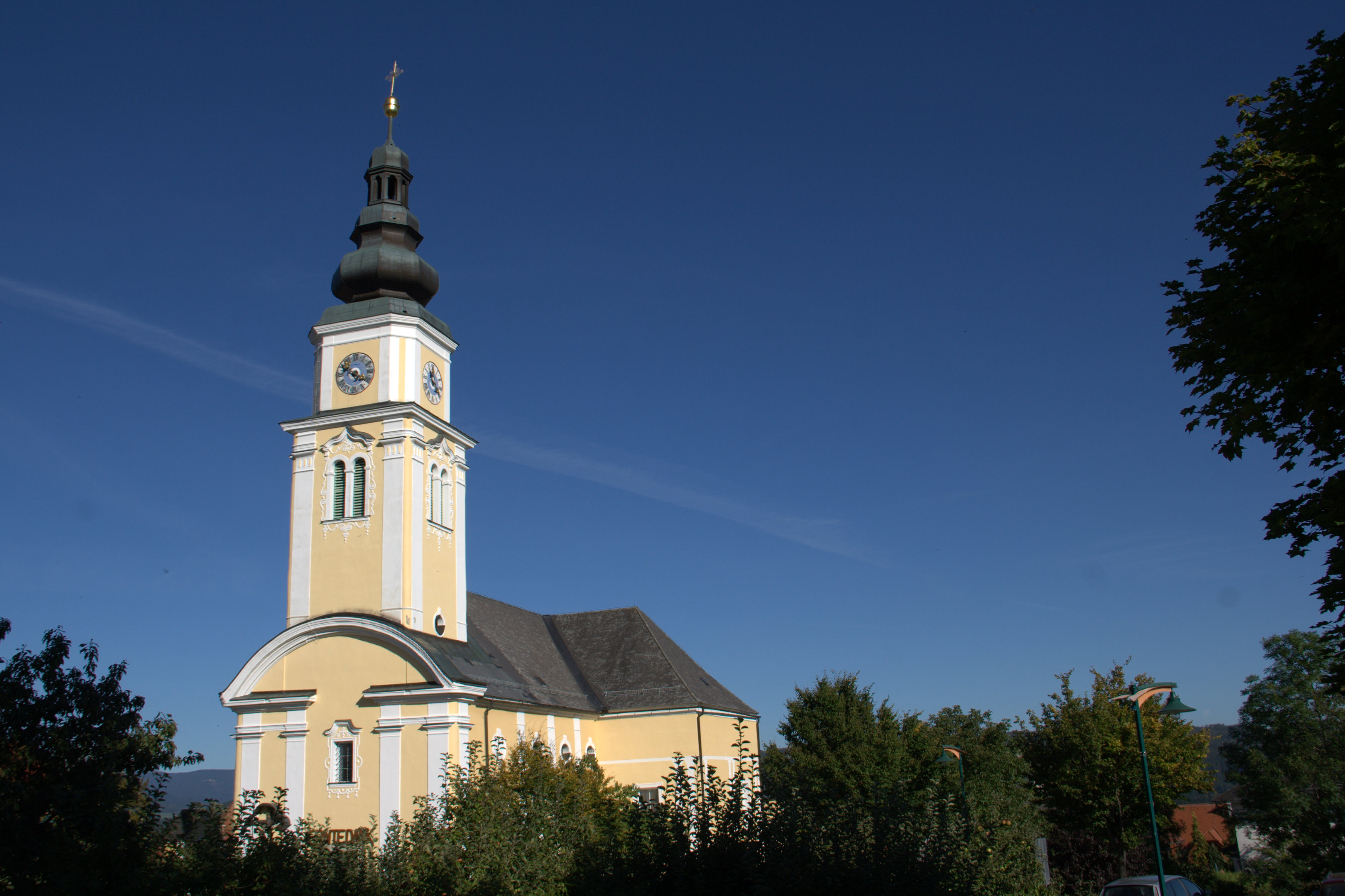 Kath. Pfarrkirche hl. Margaretha und Kirchhofmauer mit Nischenkapellen